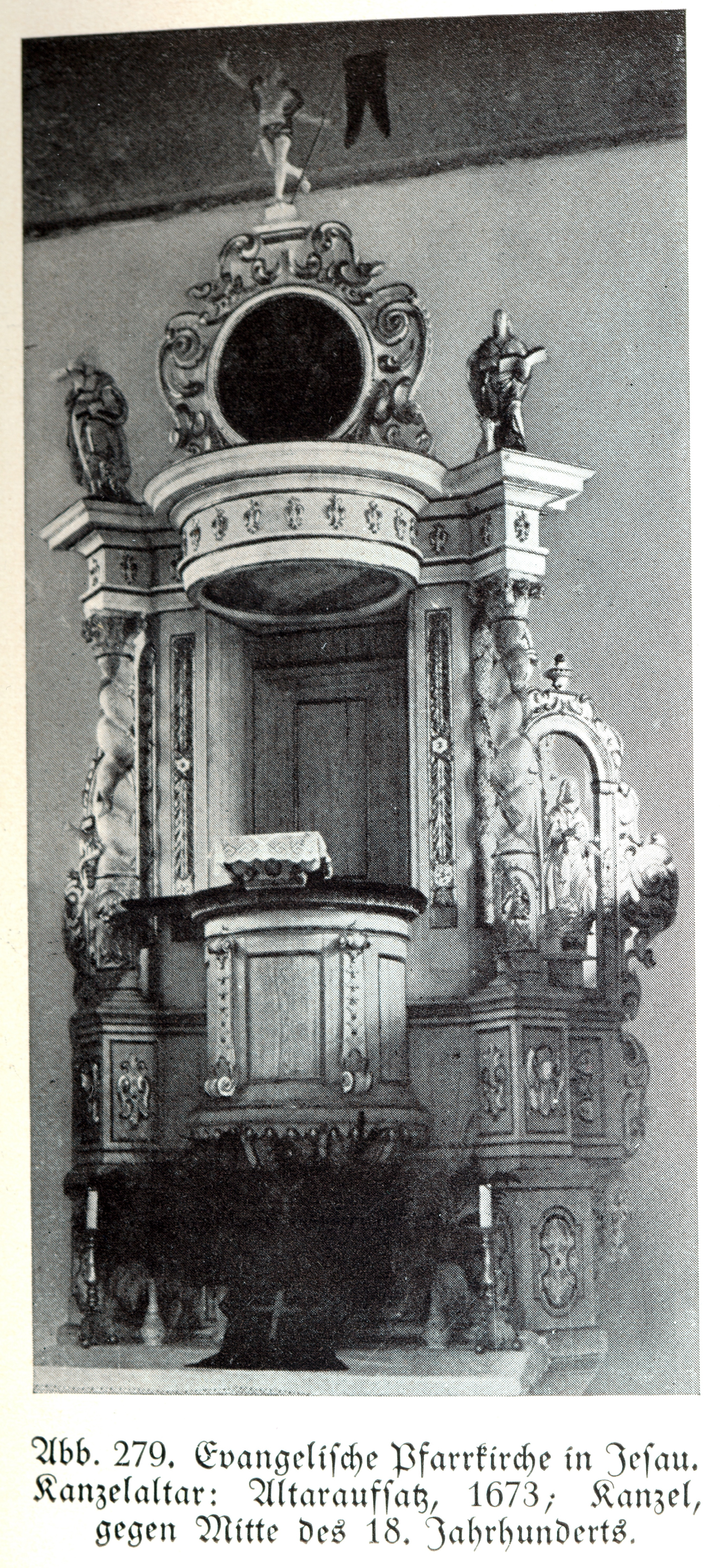 Jesau, Evangelische Pfarrkirche, Kanzelaltar, Altaraufsatz 1673, Bildhauer Joh. Pfeffer (zugeschrieben)